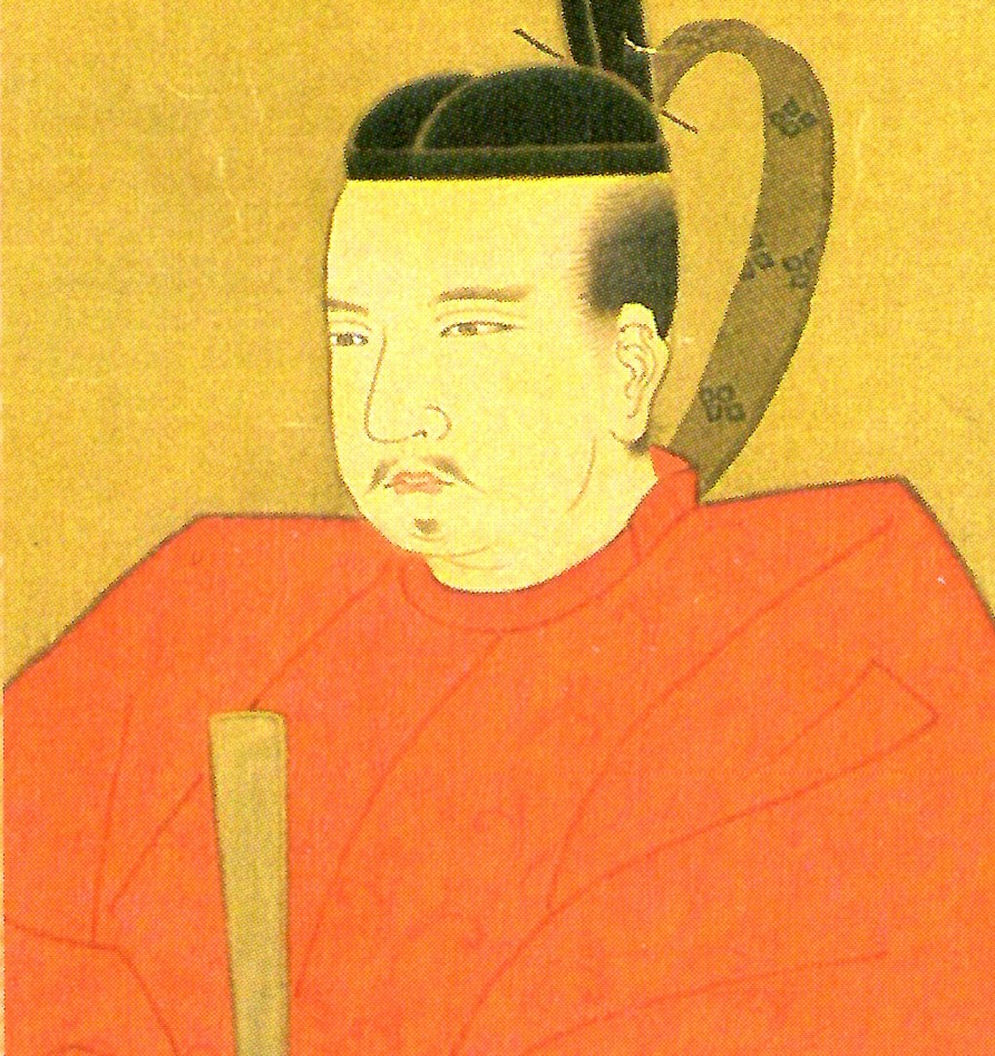 遠山友貞の肖像。